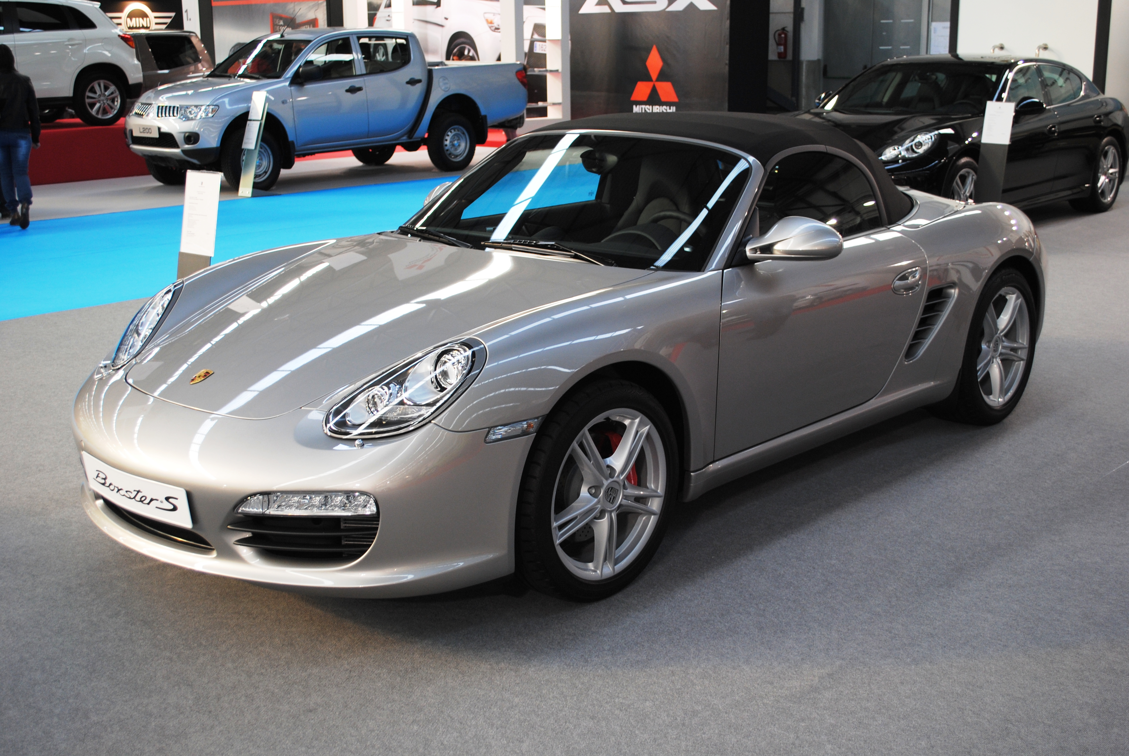 PORSCHE Boxster S, 2012, IFEVI